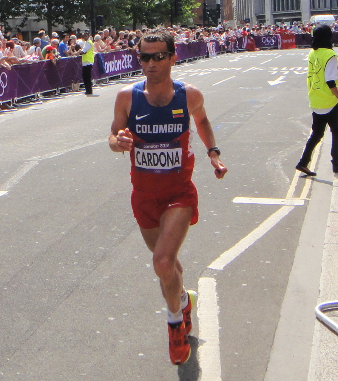 Juan Carlos Cardona (Colombia) - London 2012 Men's Marathon